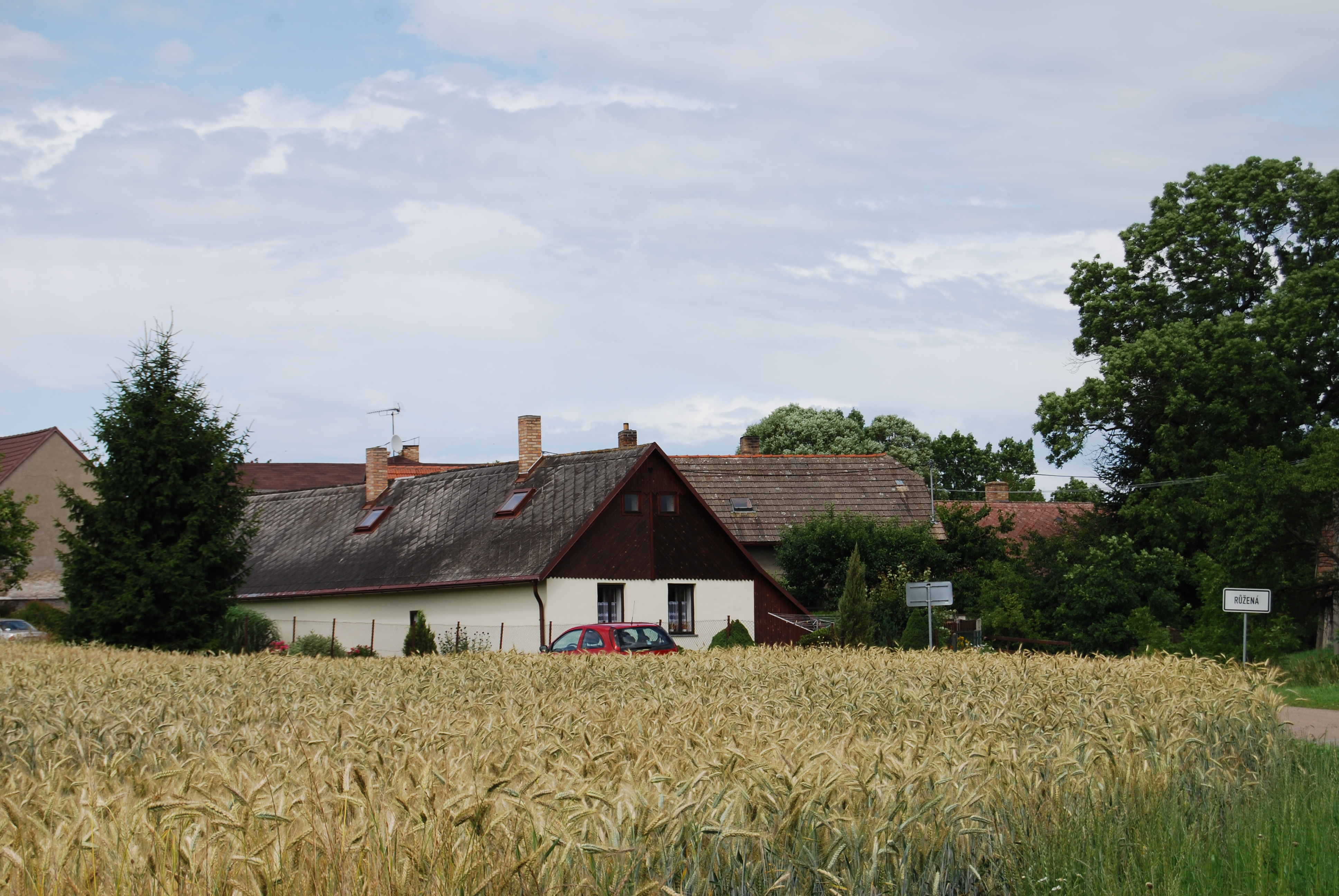 Pohled na část obce. Růžená je část obce Chyšky v okrese Písek. Česká republika.